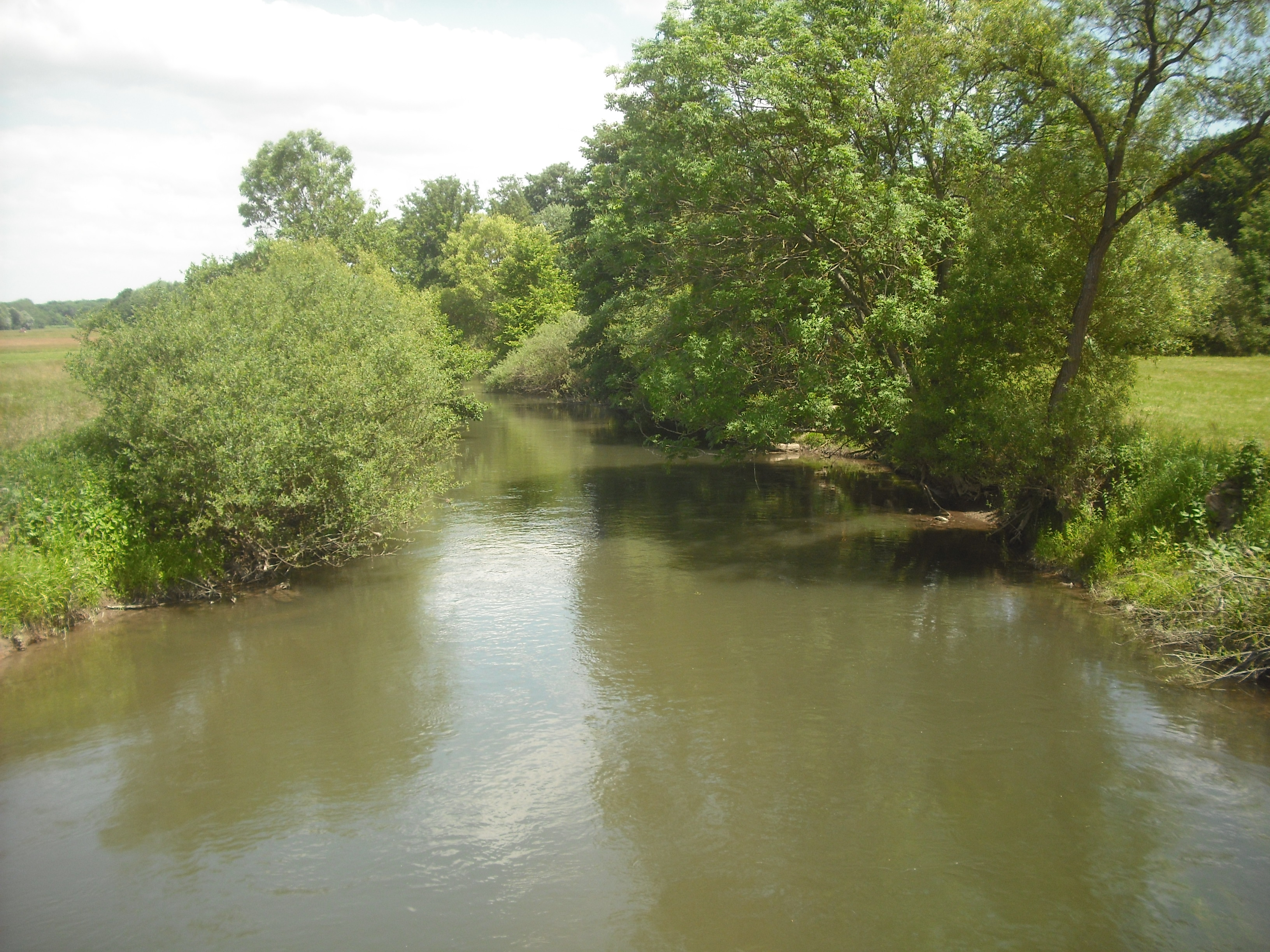 L'Ill à Sélestat, Bas-Rhin, France.